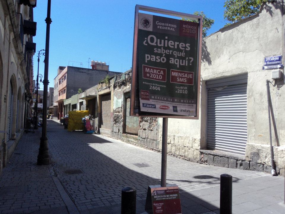 callejon manzanares